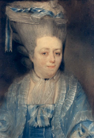 Portrait au pastel (vers 1771) de la compositrice néerlandaise Josina de Boetzelaer (Josina Anna Petronella baronne d'Aerssen), faisant pendant à celui de Carl de Boetzelaer (Wisconsin State Historical Society, don de Caroline Louisa Albertina van der Meulen, petite-fille du modèle).